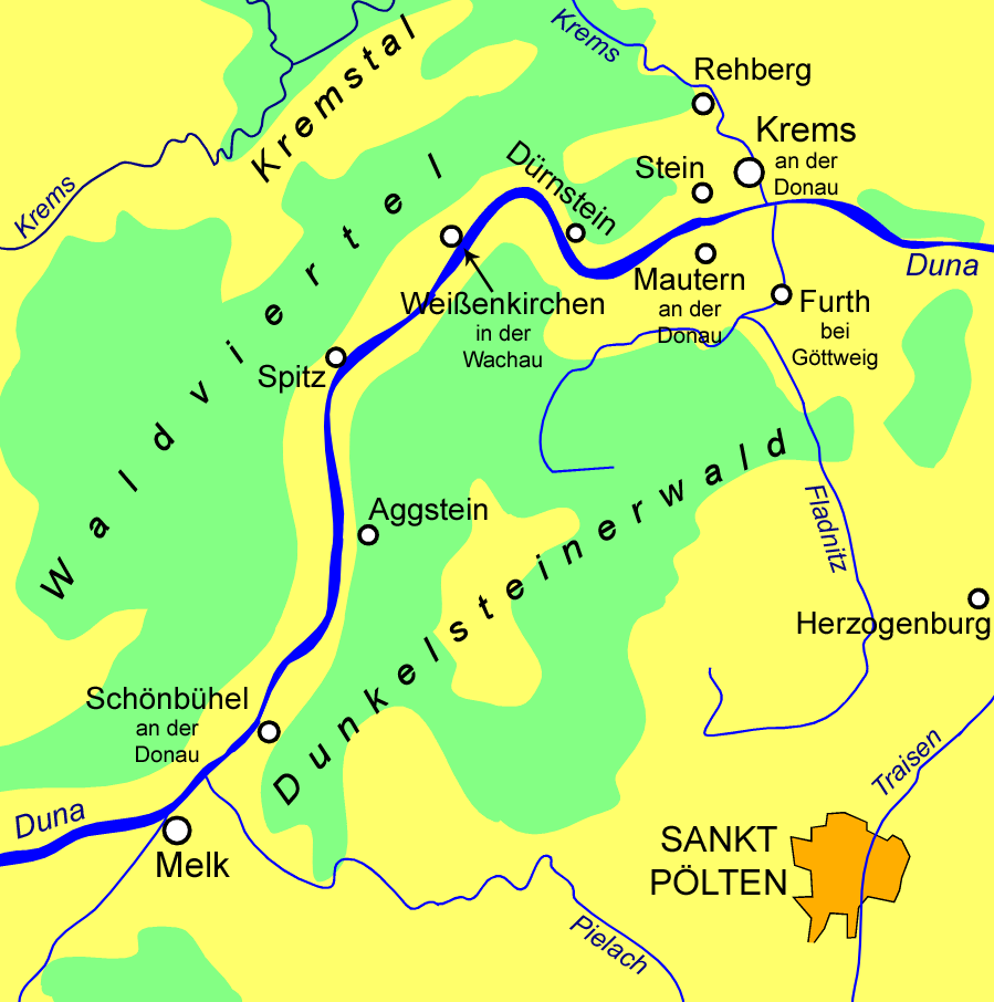 Az ausztriai wachaui kultúrtáj átnézeti térképe